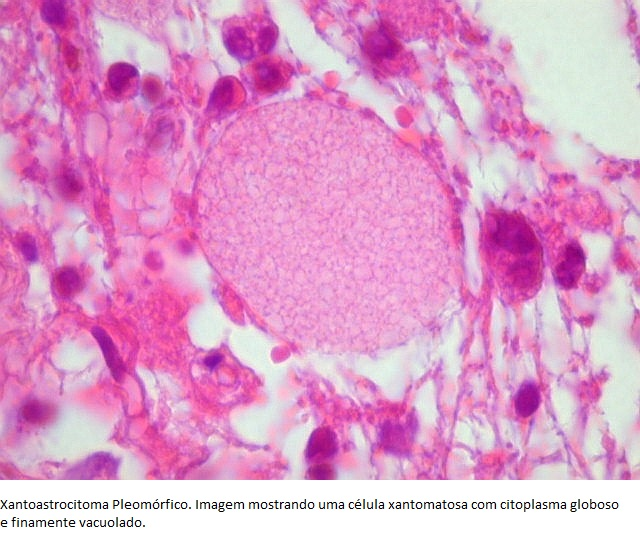 Célula xantomatosa.